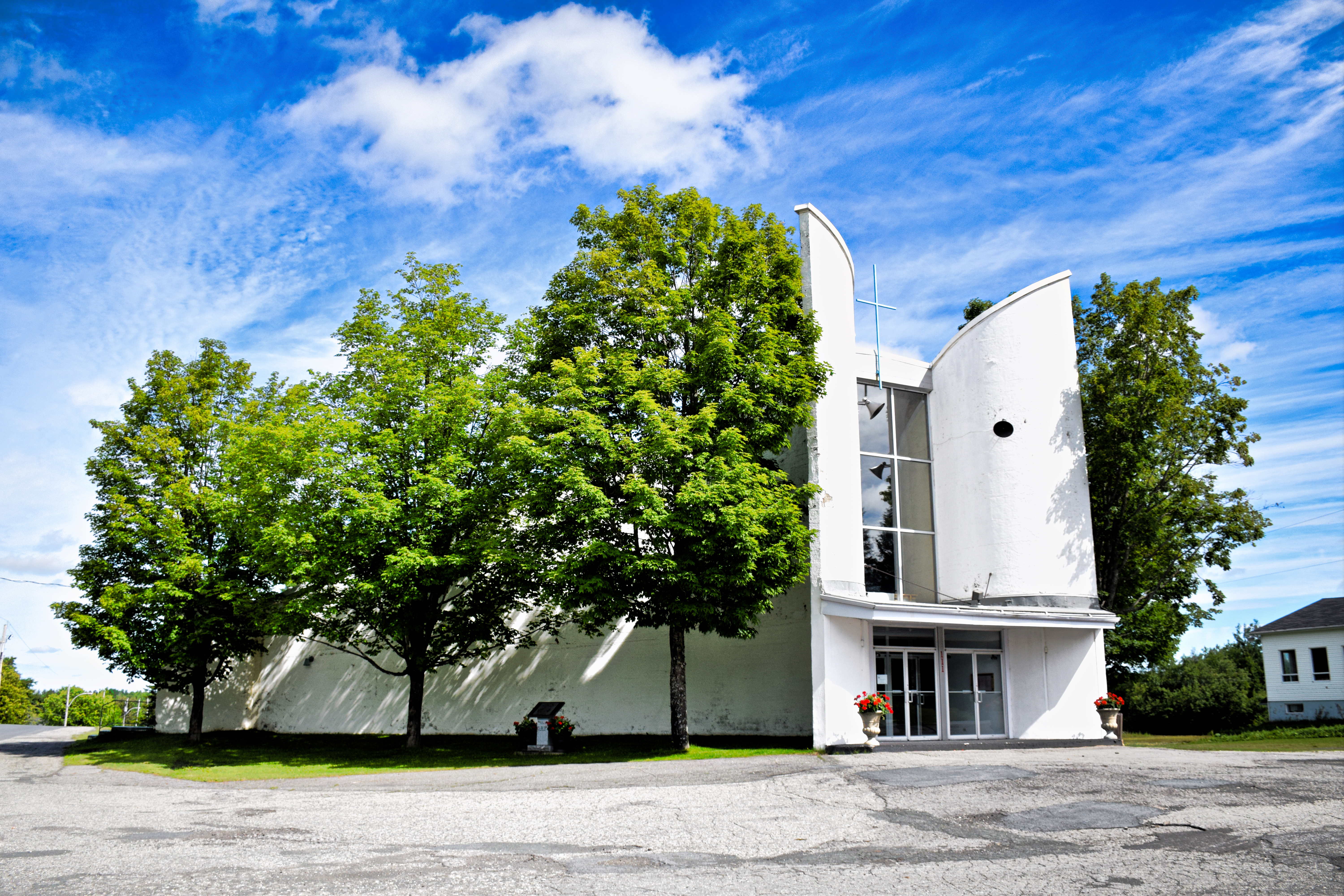 Église Saint-Louis-de-Gonzague de Saint-Louis-de-Gonzague dans Les Etchemins, construite en 1961 avec les plans de l'architecte Jean-Marie Roy.